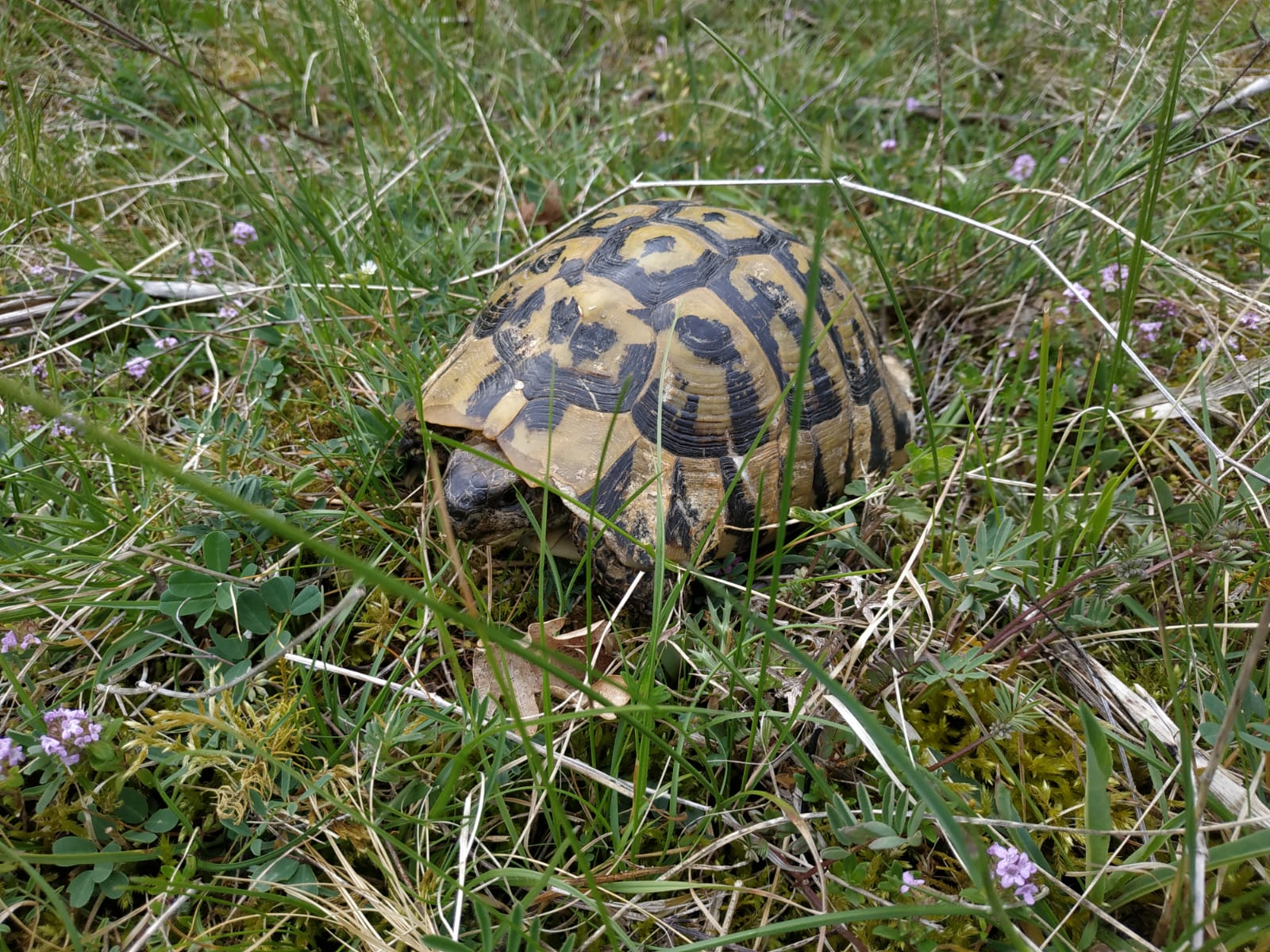 Kopnena kornjača snimljena u Umljanovićima